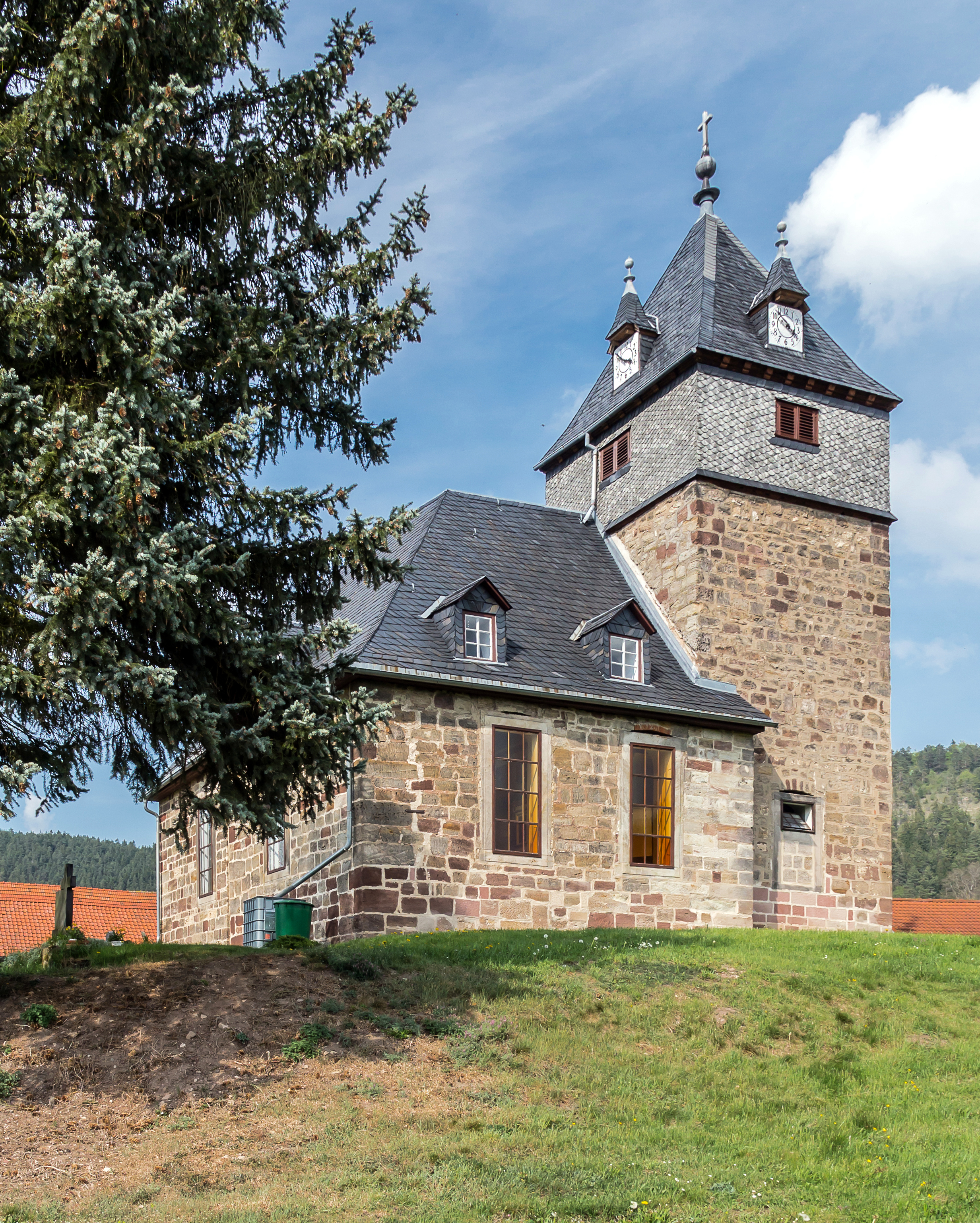 Denkmalgeschützte Kirche in Solsdorf, Ortsteil von Königsee-Rottenbach, Südwestansicht